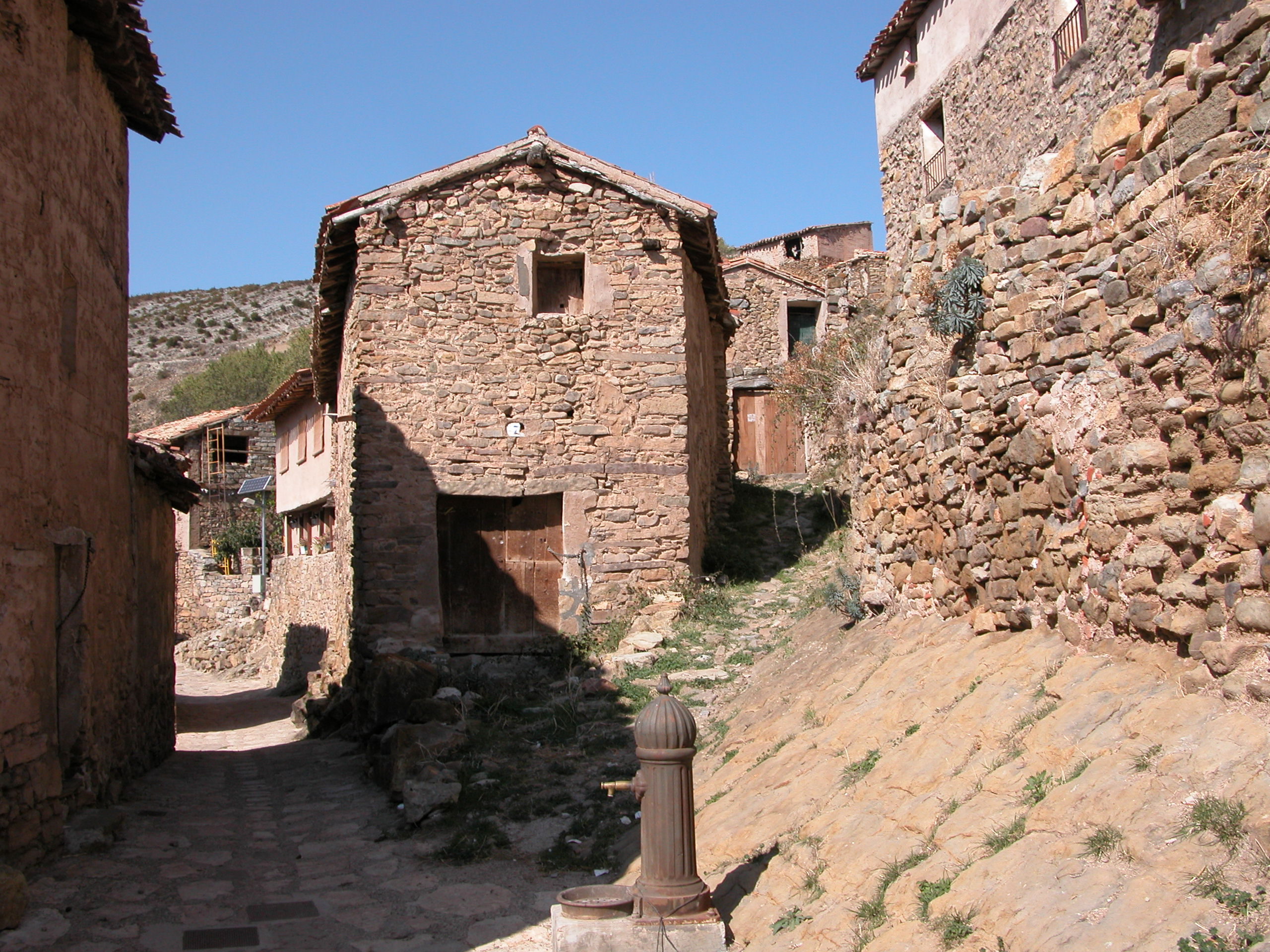 San Martín, aldea de Santa Engracia del Jubera en La Rioja, España.